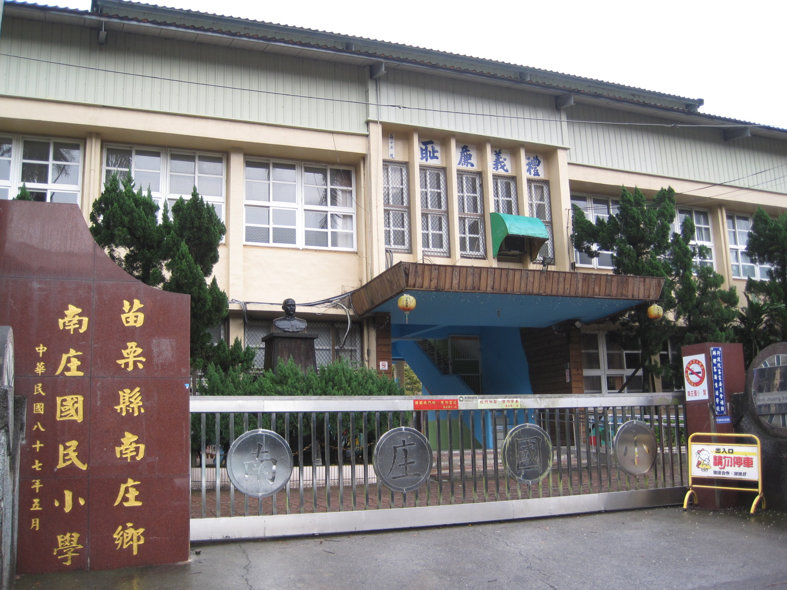 中文（台灣）: 苗栗縣南庄鄉南庄國民小學，位於臺灣苗栗縣南庄鄉東村文化路3號。